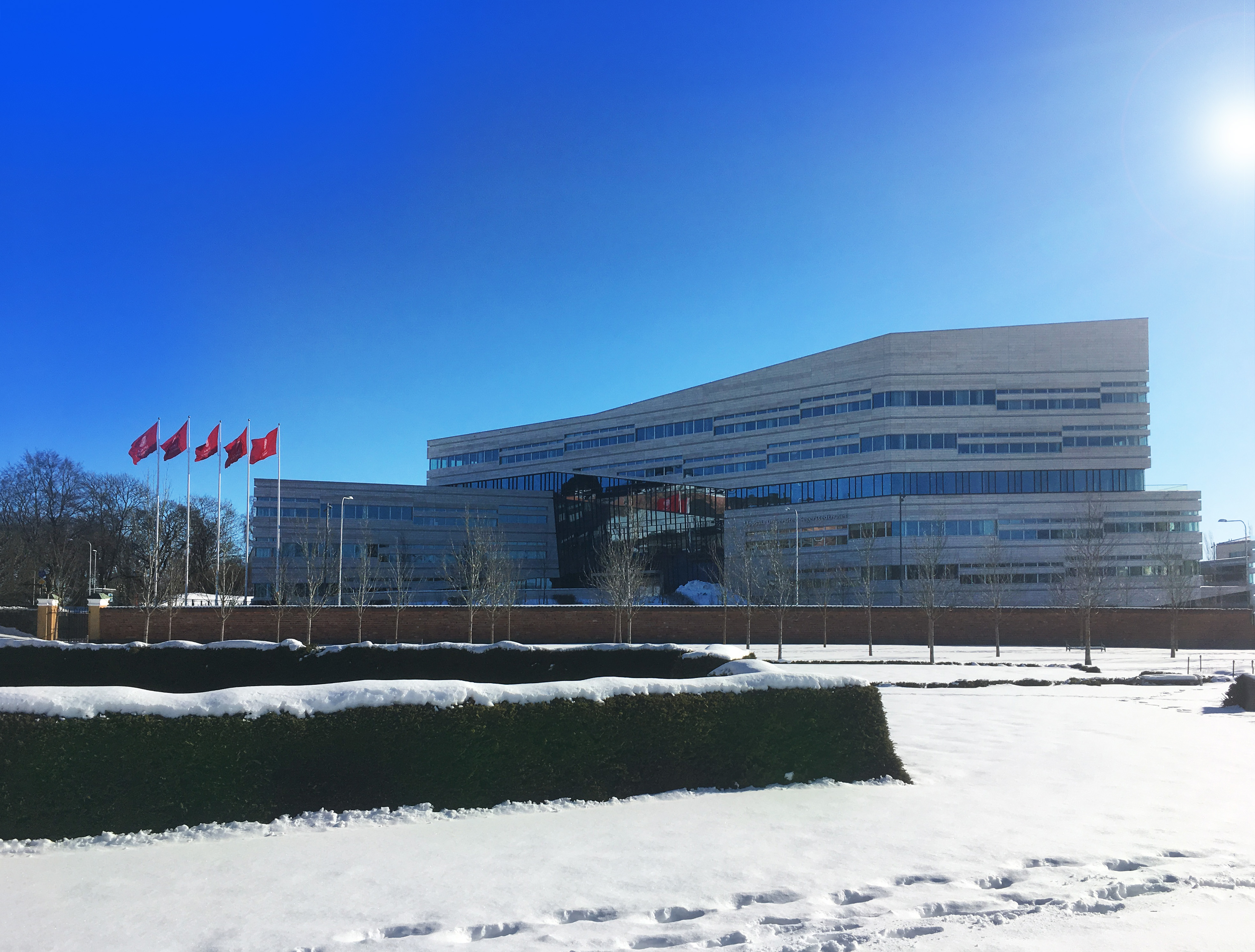 Uppsala universitets huvudbyggnad, Segerstedthuset sett från norr (Botaniska trädgården), vinter 2018. Arkitekter bland annat: 3XN, Indicum